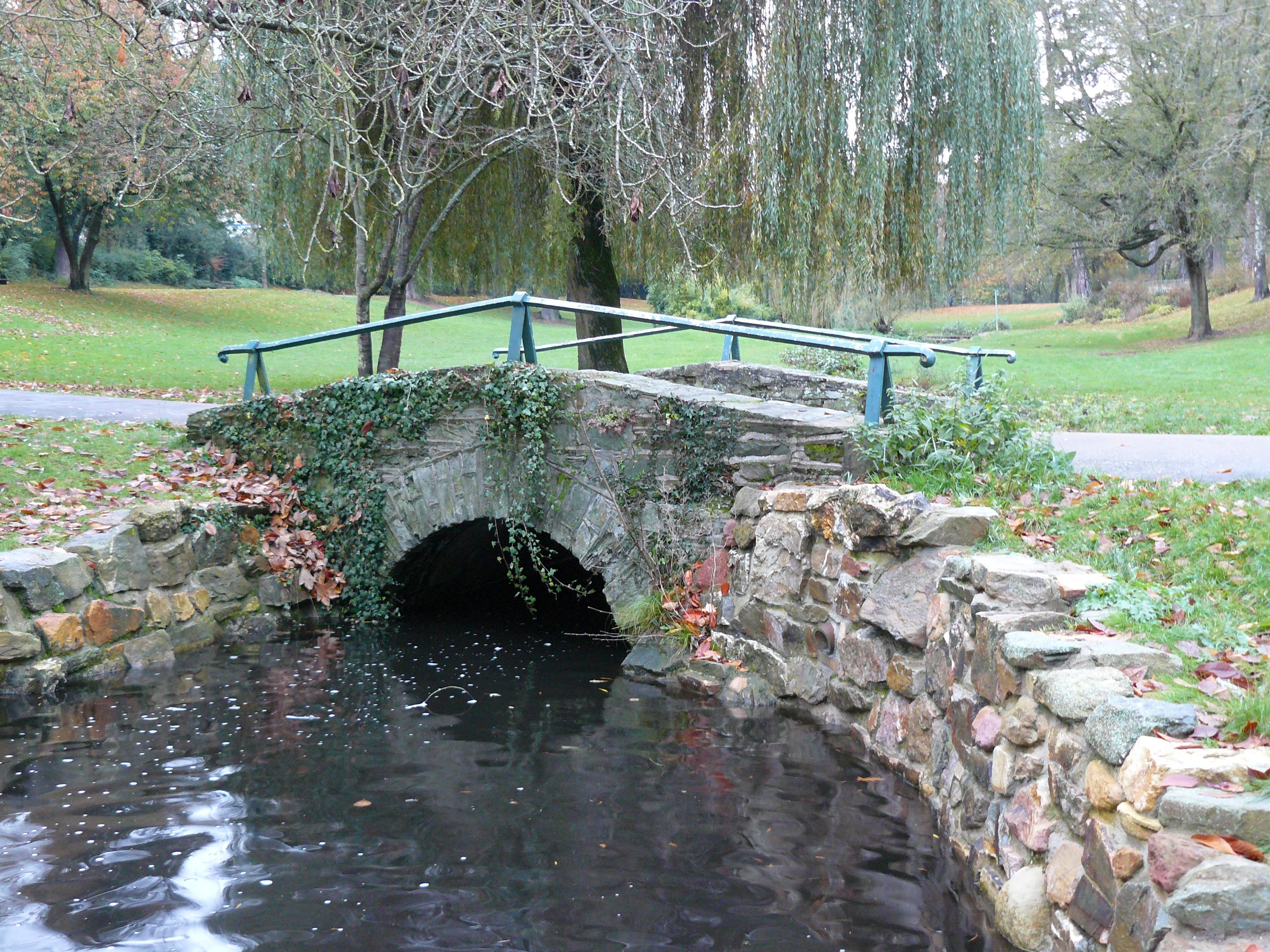 Im Sinne des Deutschen Werkbundes errichtet, erbaut 1909 einzige Brücke innerhalb der Albrecht-Dürer-Anlage